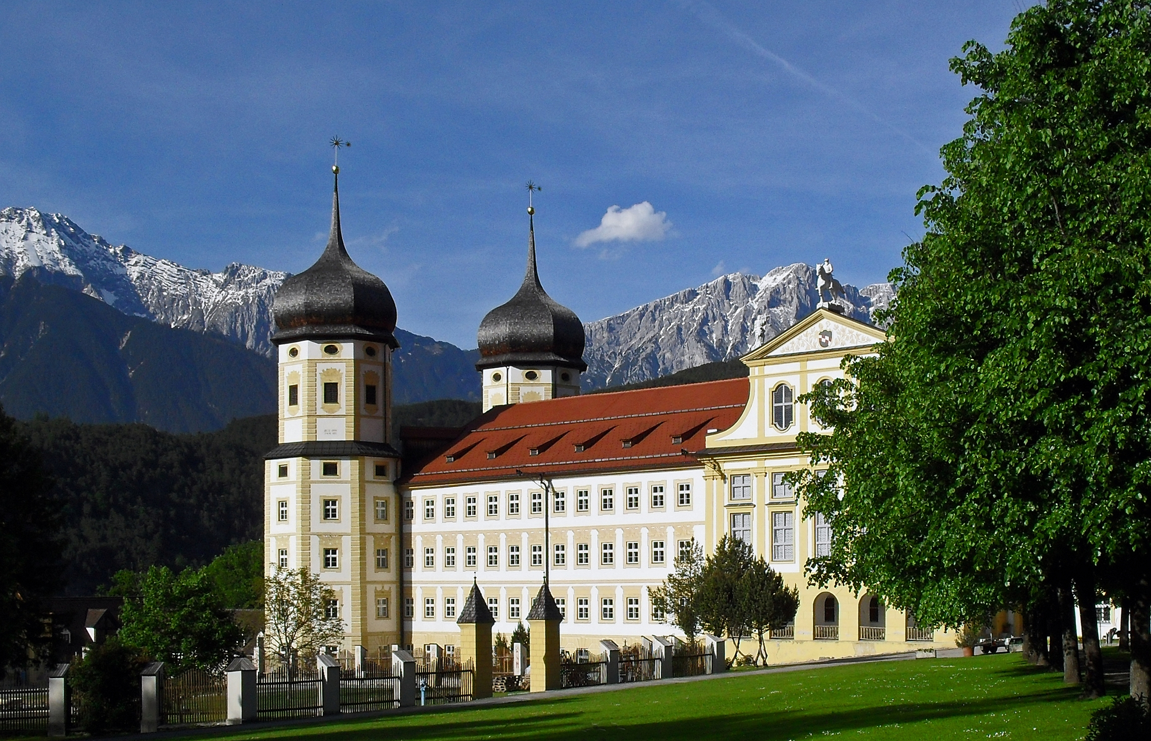 Gesamtanlage, Zisterzienserstift Stams